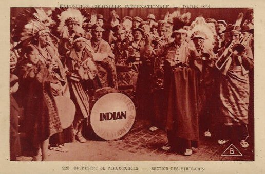 L'orchestre indien à l'Exposition Coloniale de Paris en 1931